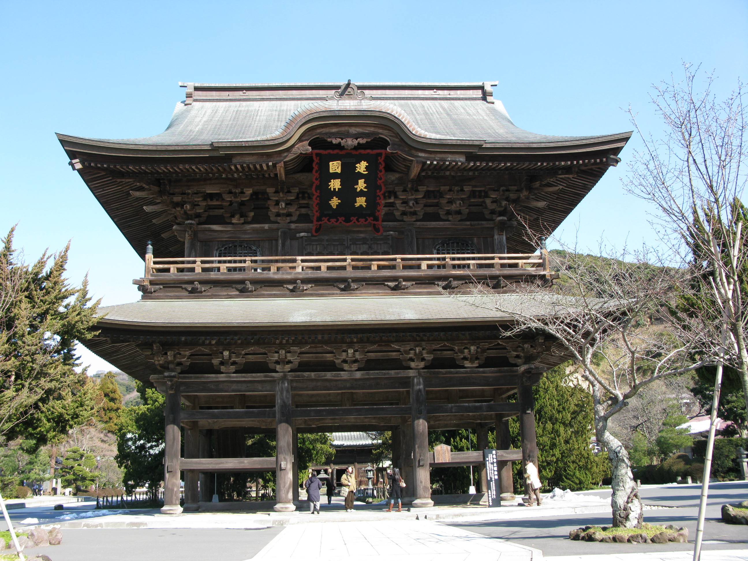 Samon of Kencho-ji, Kamakura, Kanagawa, Japan